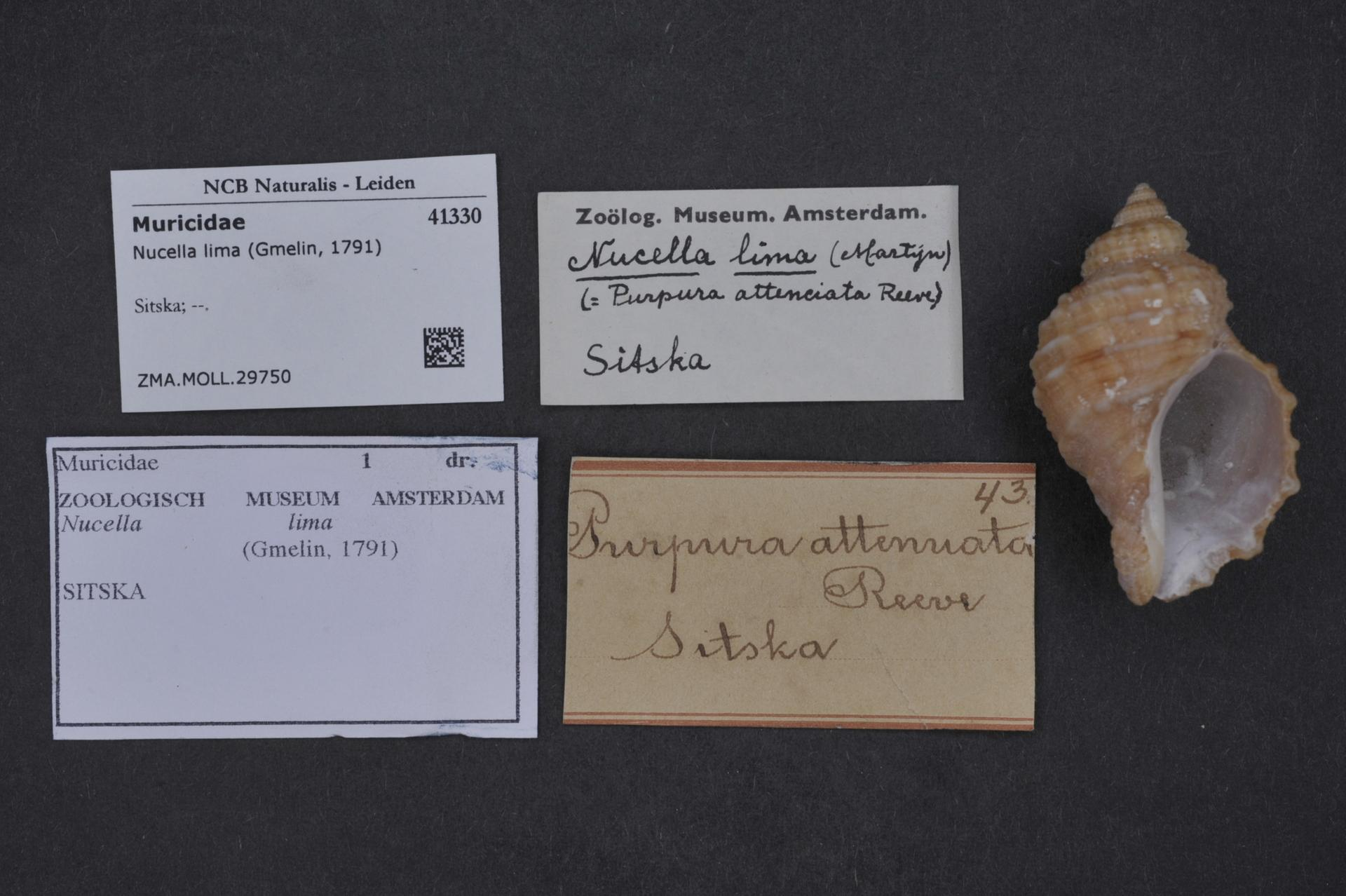 Nucella lima (Gmelin, 1791)